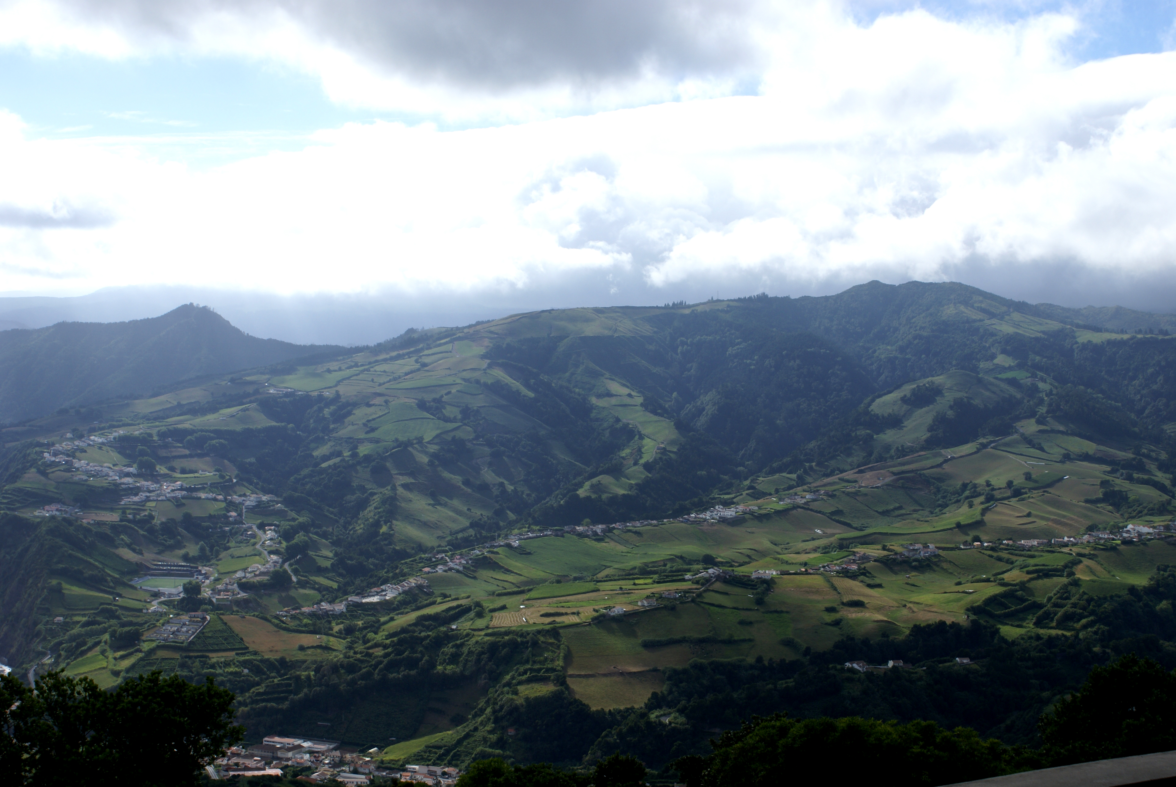 Miradouro do Pico dos Bodes, montanhas, Ribeira Quente, Povoação, ilha de São Miguel, Açores